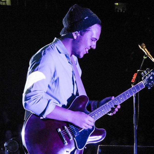 Callum Burrows blue 2014